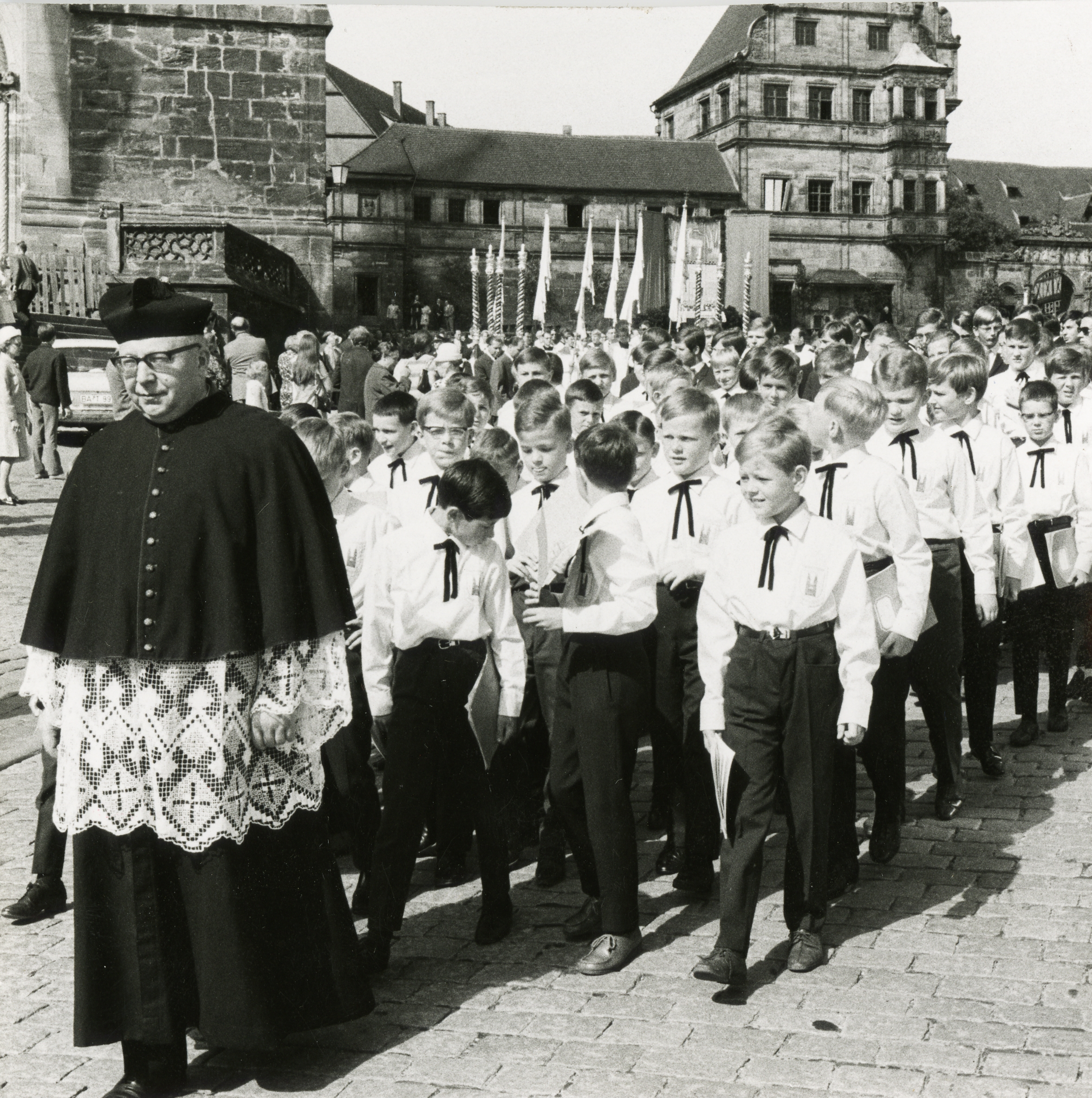 eigene Datei